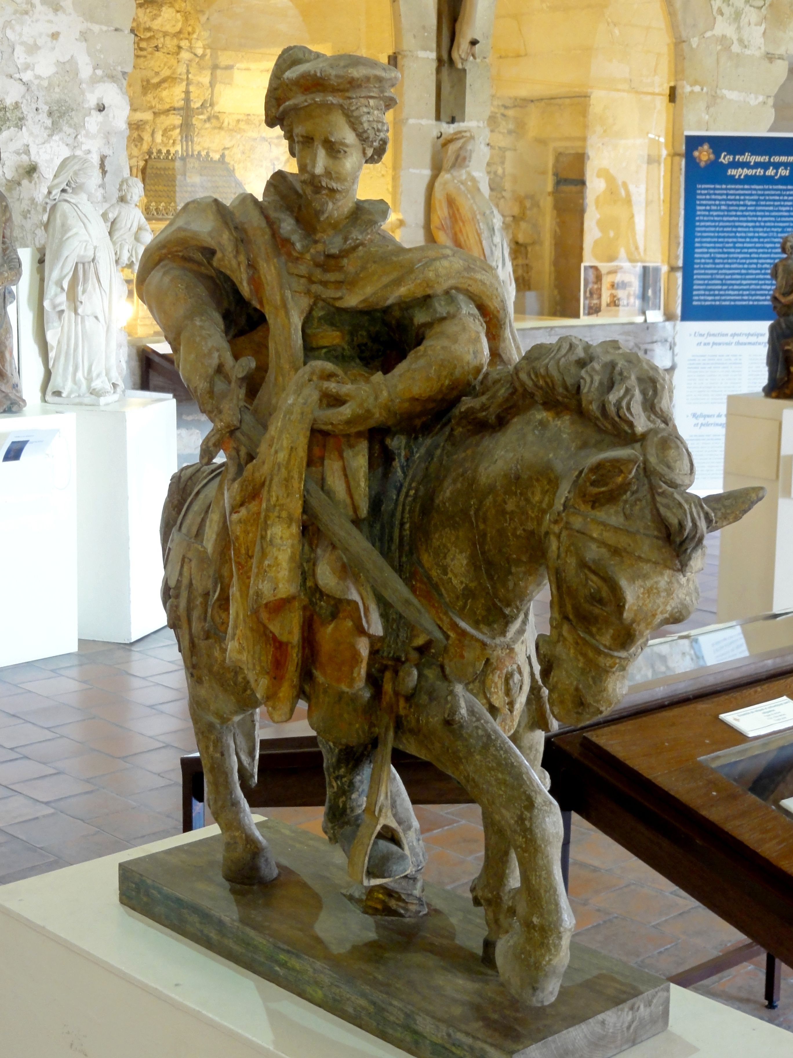 Voir titre.